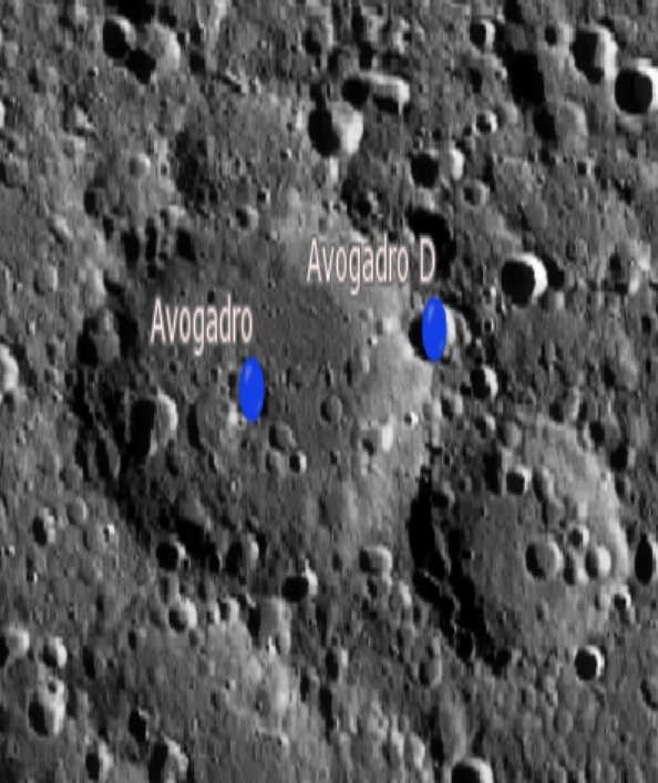 Cráter lunar Avogadro. Cráteres satélite. (Imagen LRO)